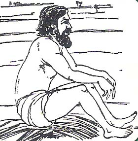 He belongs to sixteenth century. He find God within him and also within others. Being a poet he conveyed his thoughts in simple version. இடைக்காட்டுச்சித்தர்